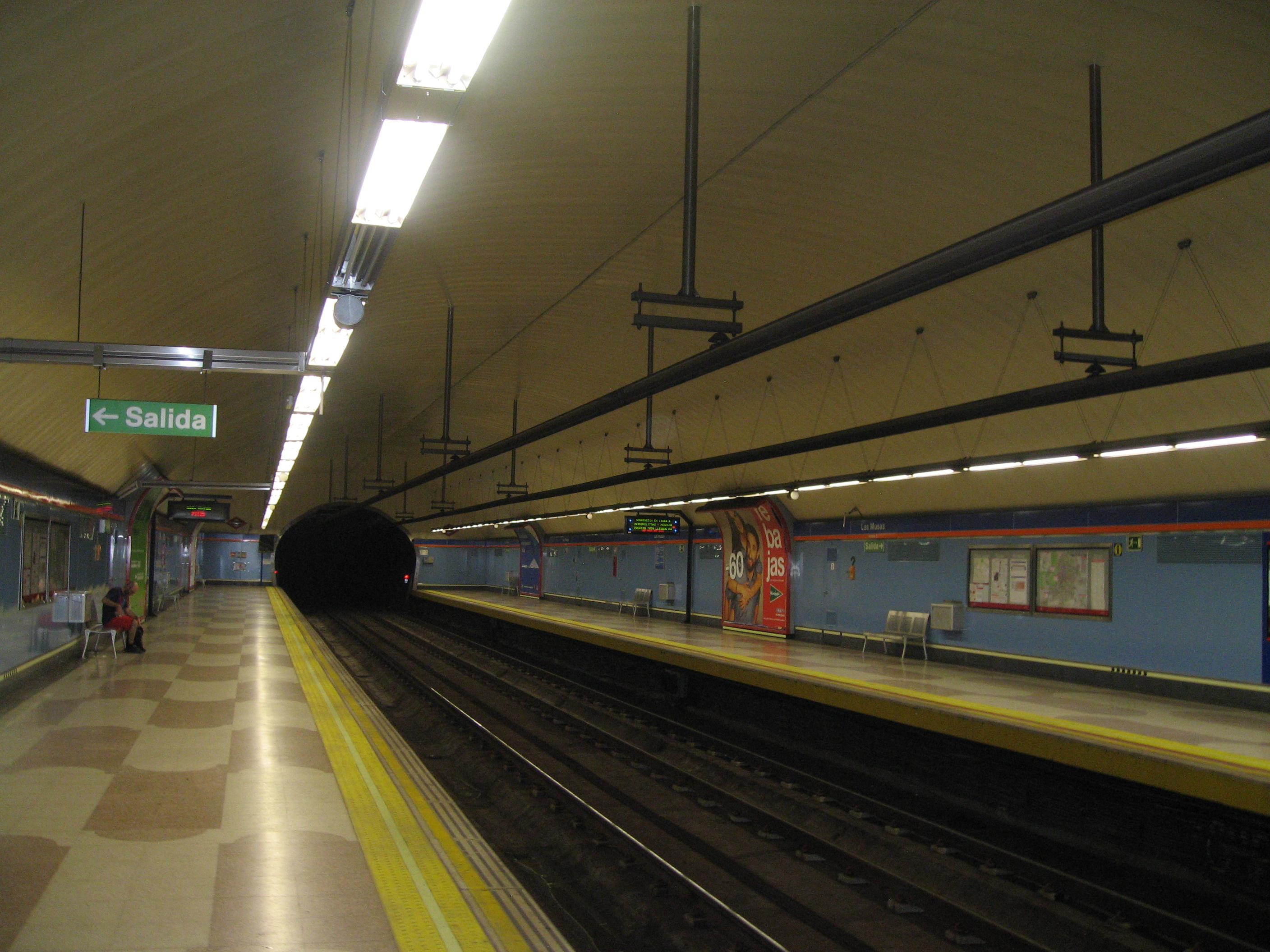 Vista del andén.